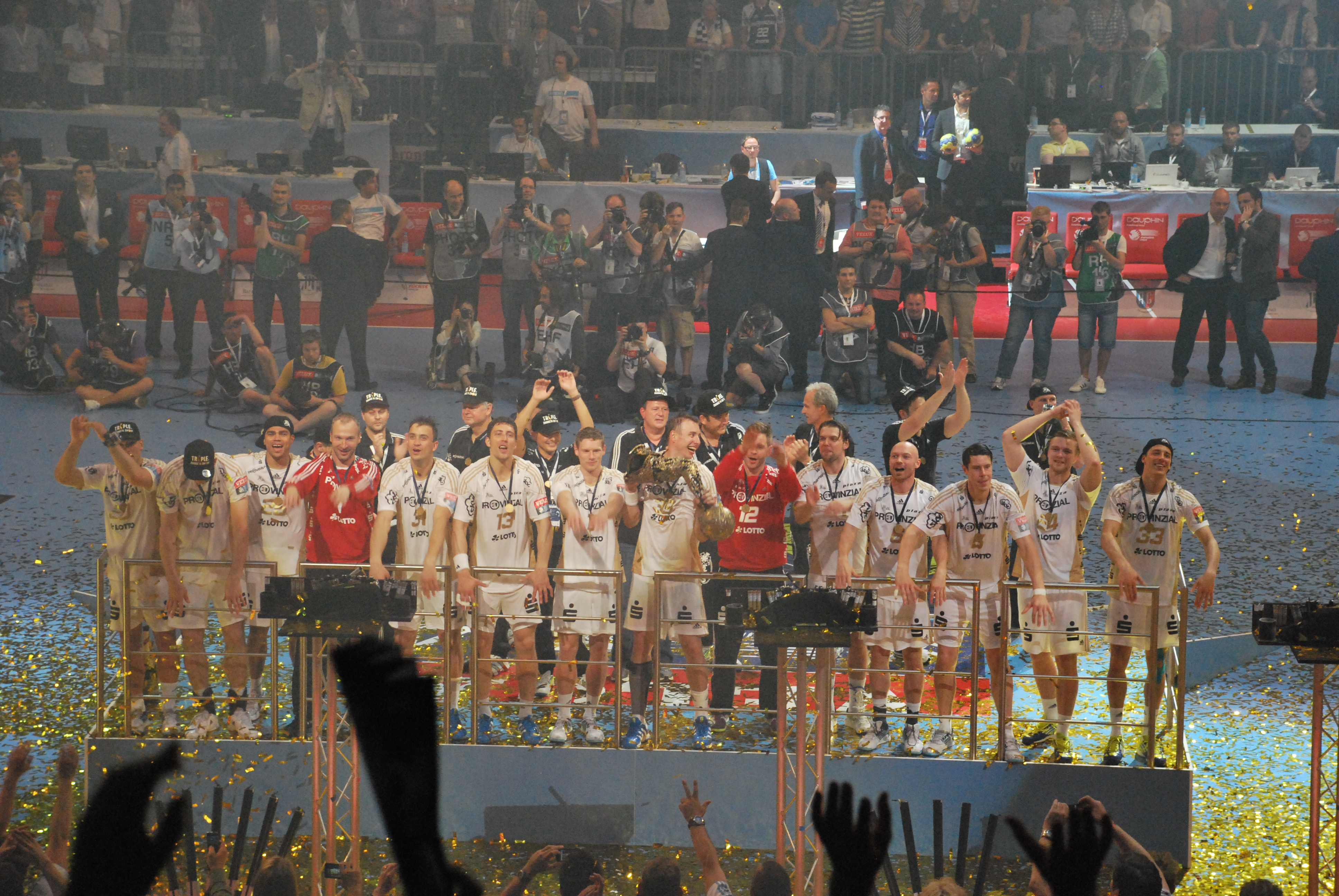 Der THW Kiel bei der Siegerehrung der EHF Champions League 2011/12.